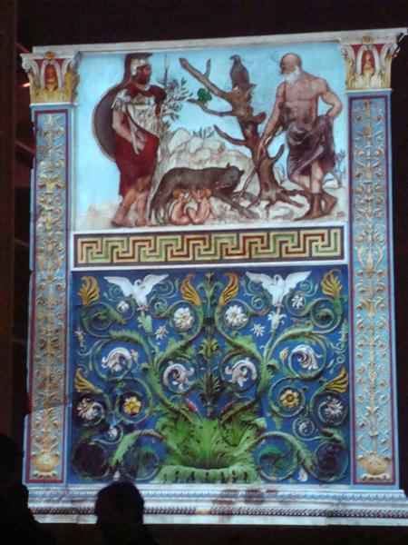 Lupercale a colori